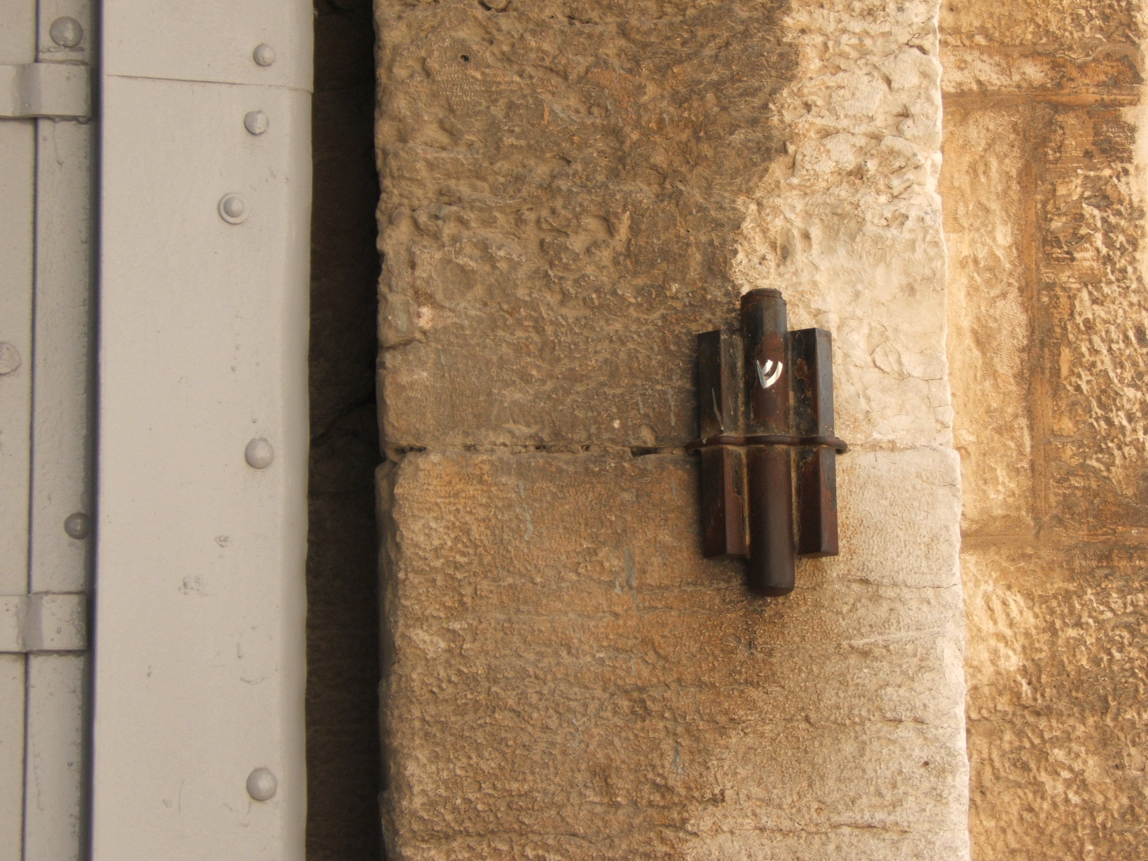 Category:Mezuzah attached at the Jaffa Gate in Jerusalem Mezuzá enclavada en la puerta de Jafa; Jerusalén, Israel.